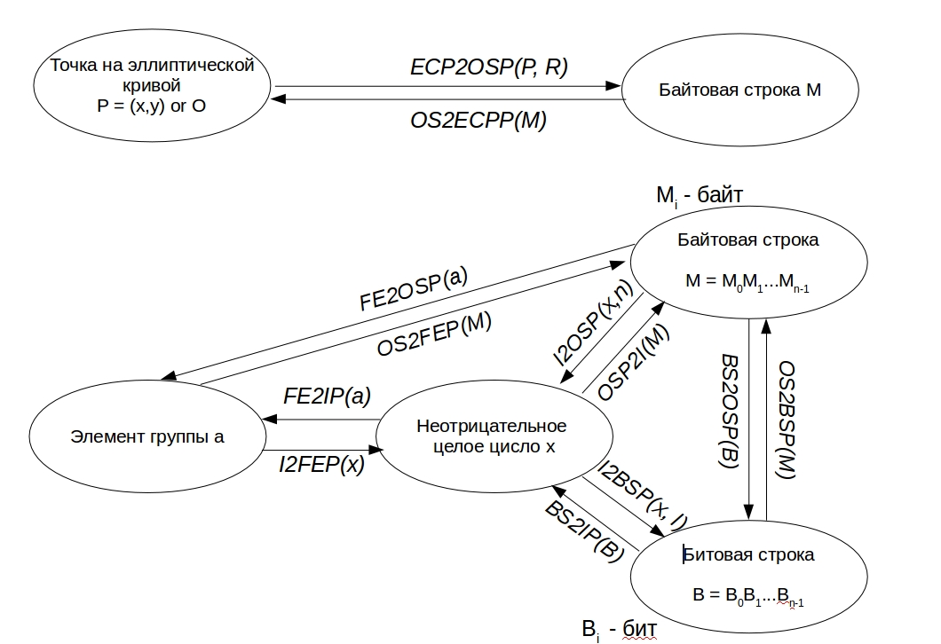 Преобразования между типами данных в алгоритме PSEC-KEM